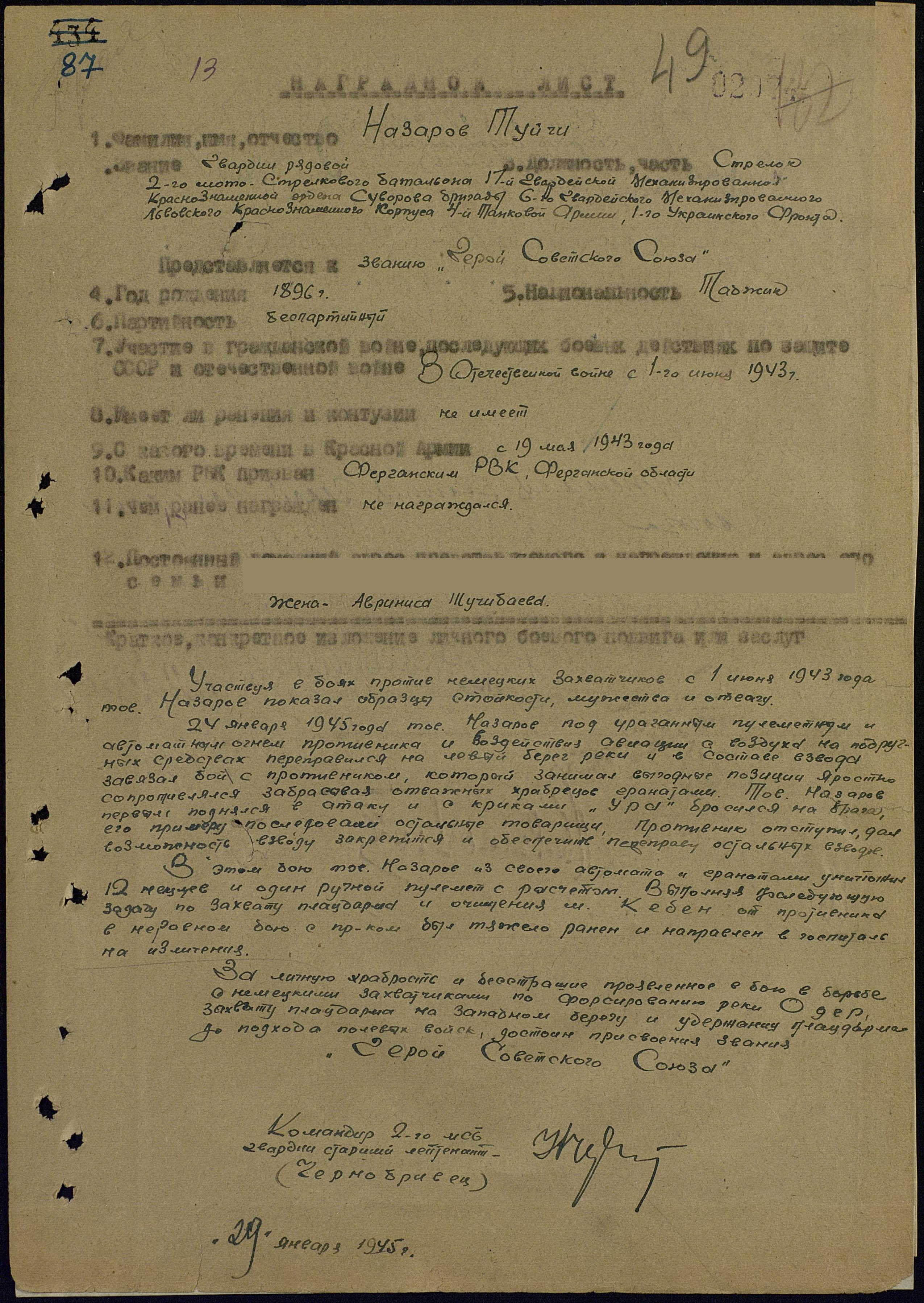 Назаров Т. наградной лист представления к званию Герой Советского Союза